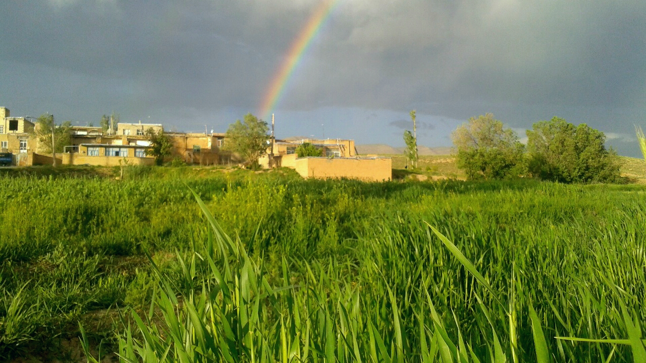 Rainbow in Dashkasan